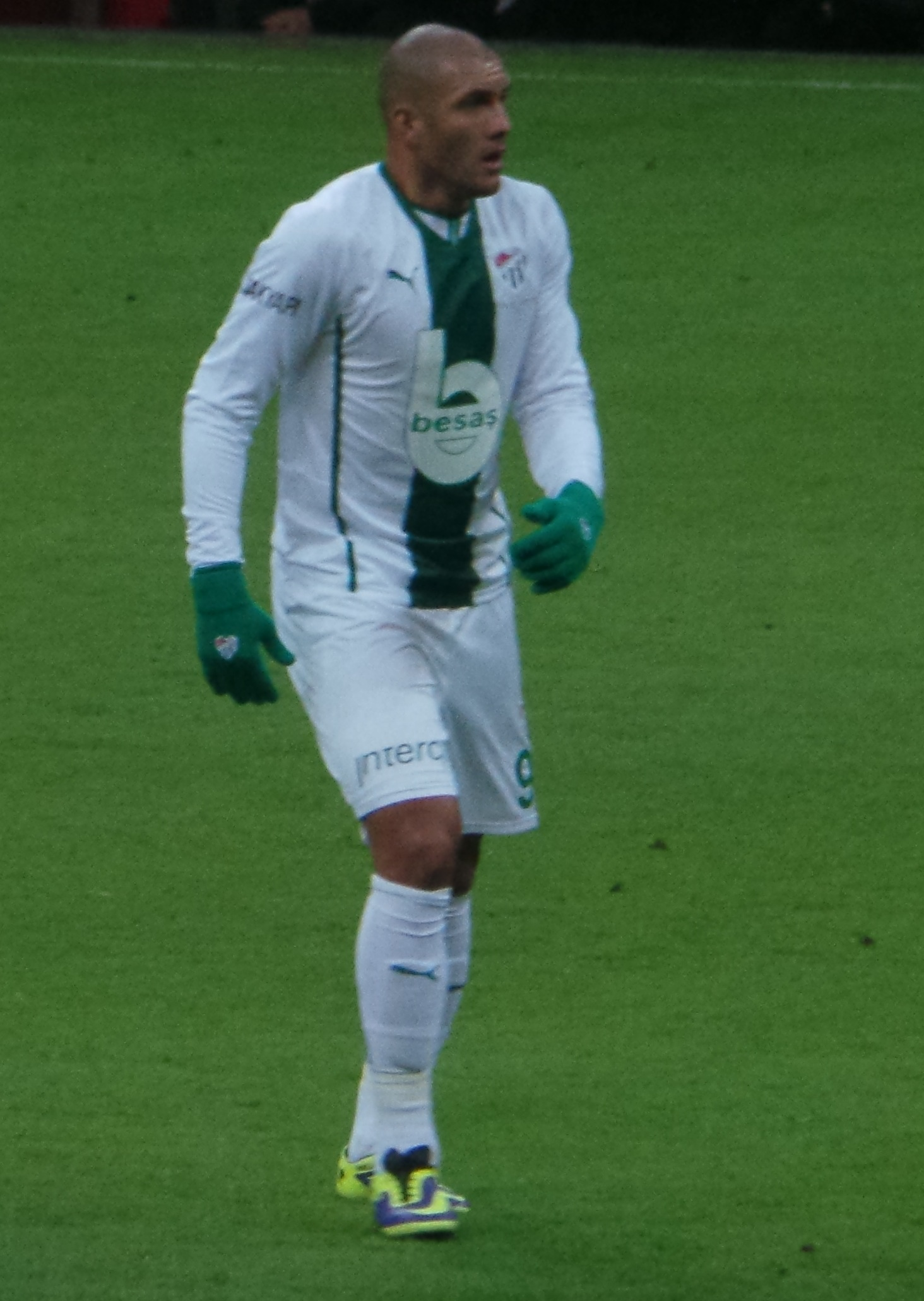 Fernandao wirh Bursaspor aginst G.S.